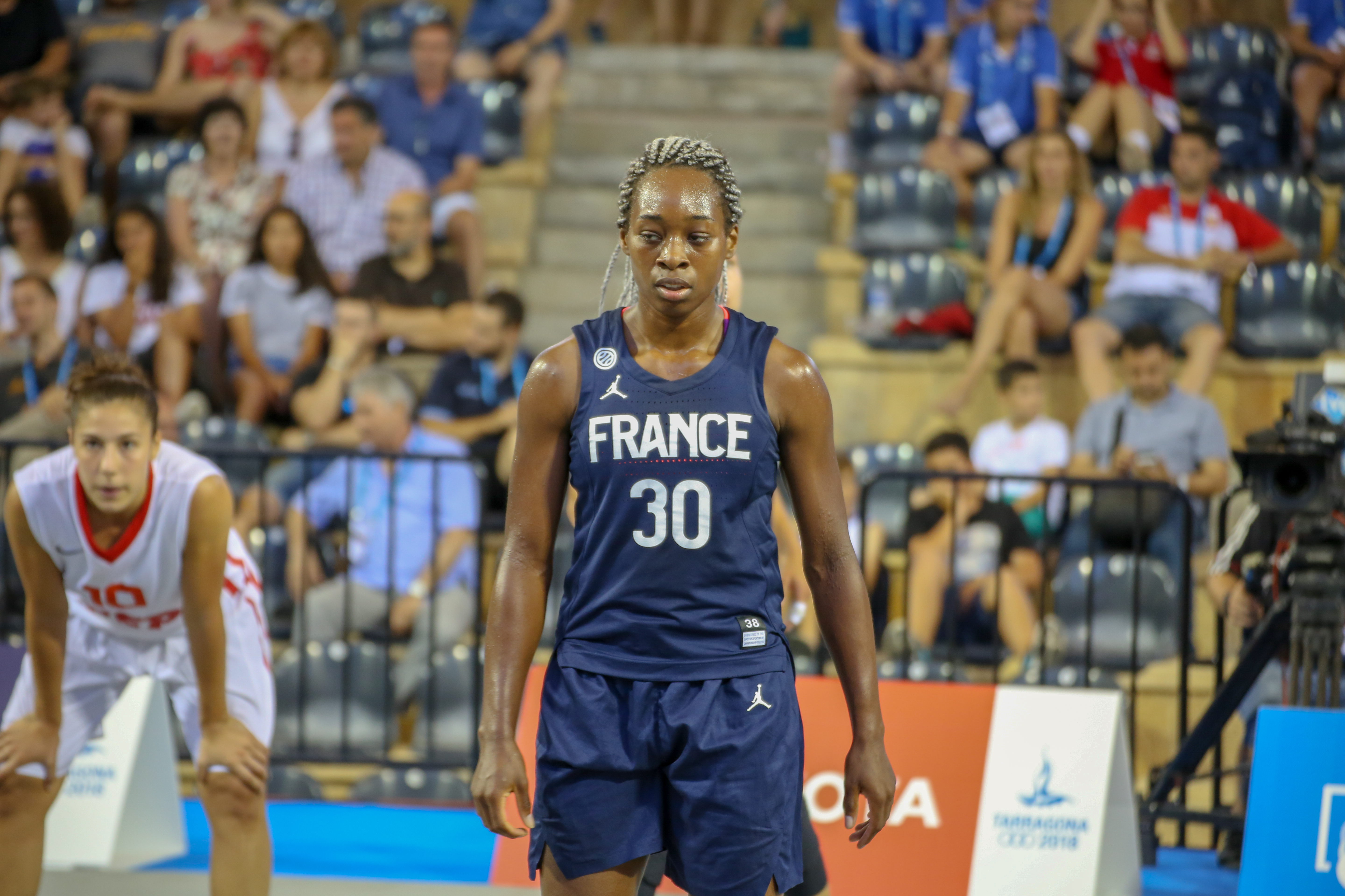 Victoria Majekodunmi en los Juegos del Mediterráneo 2018